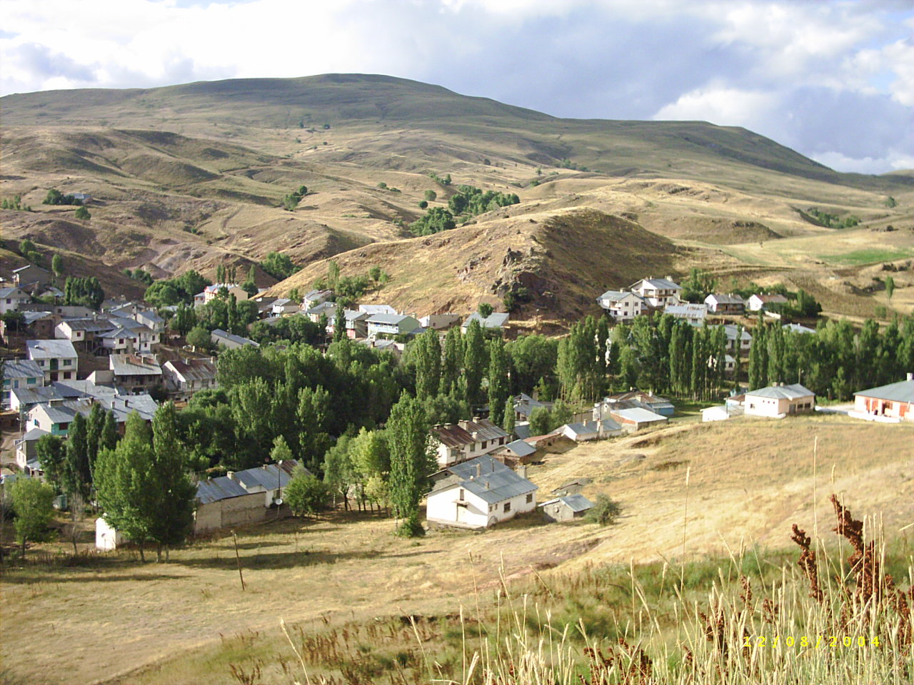 Fotoğraf bana aittir.